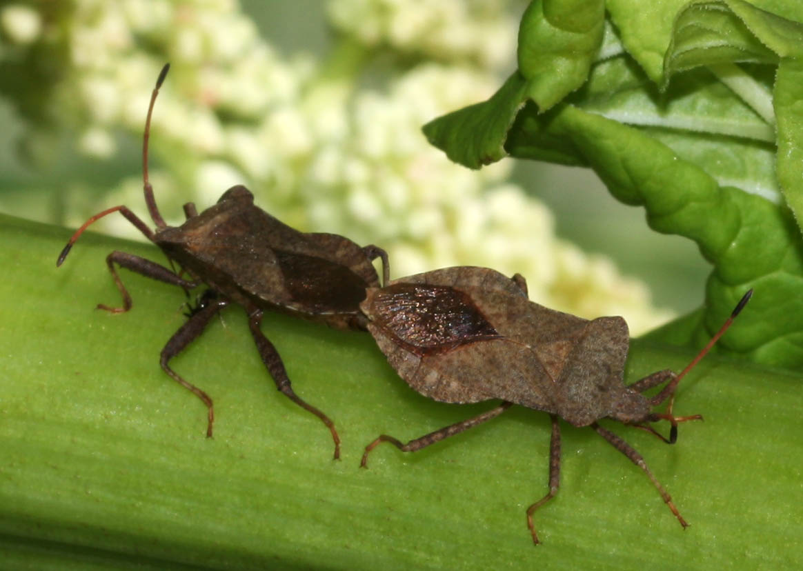 Coreus marginatus, Saumwanzen bei der Paarung